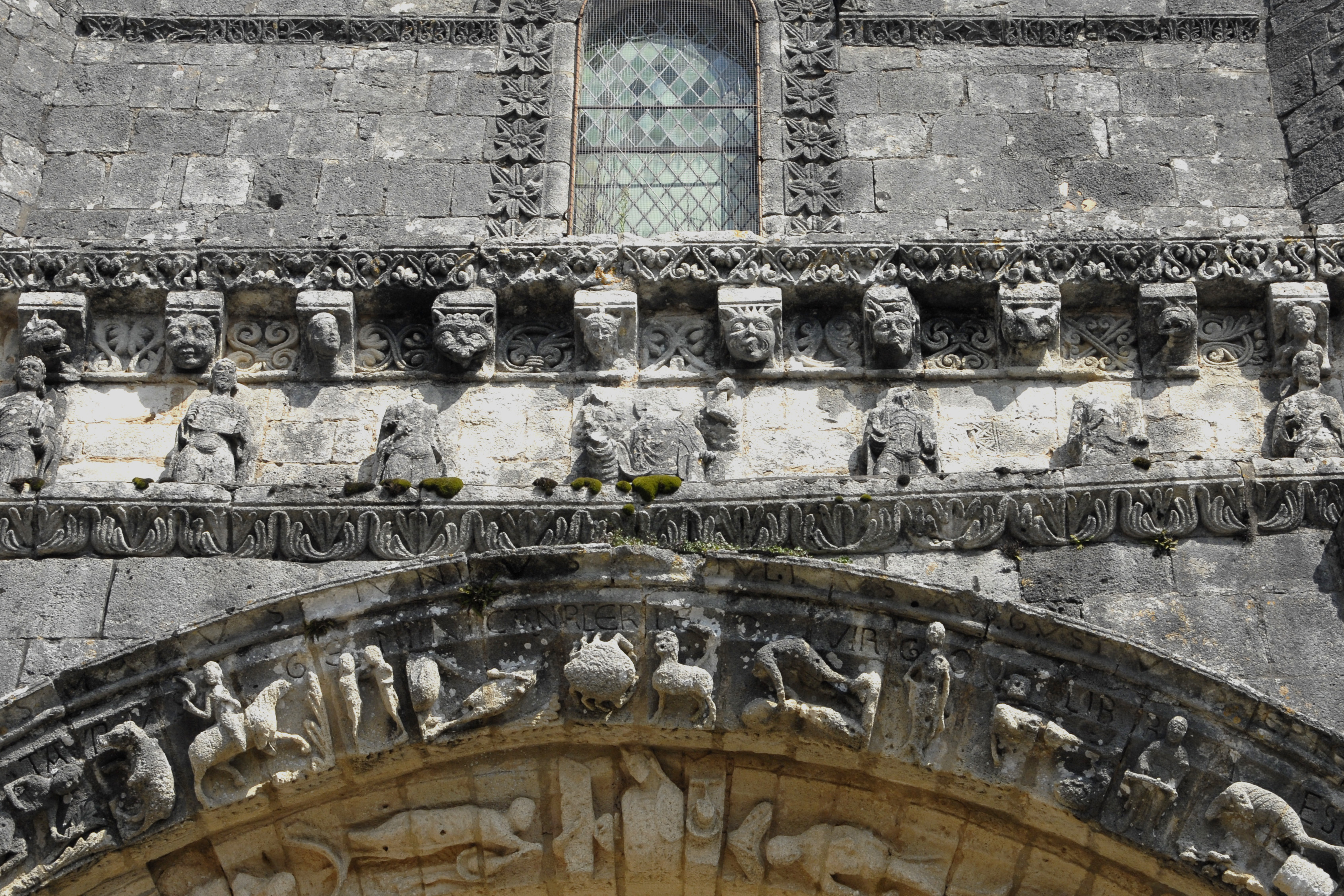 Fenioux,Fassade über Scheitel des Hauptportals